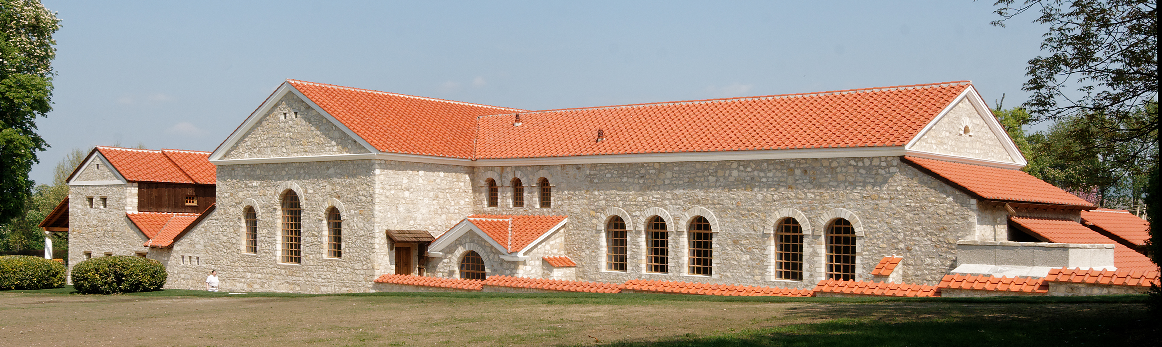 Rekonstruktion der Thermen von Carnuntum, Gemeinde Petronell-Carnuntum, Niederösterreich.